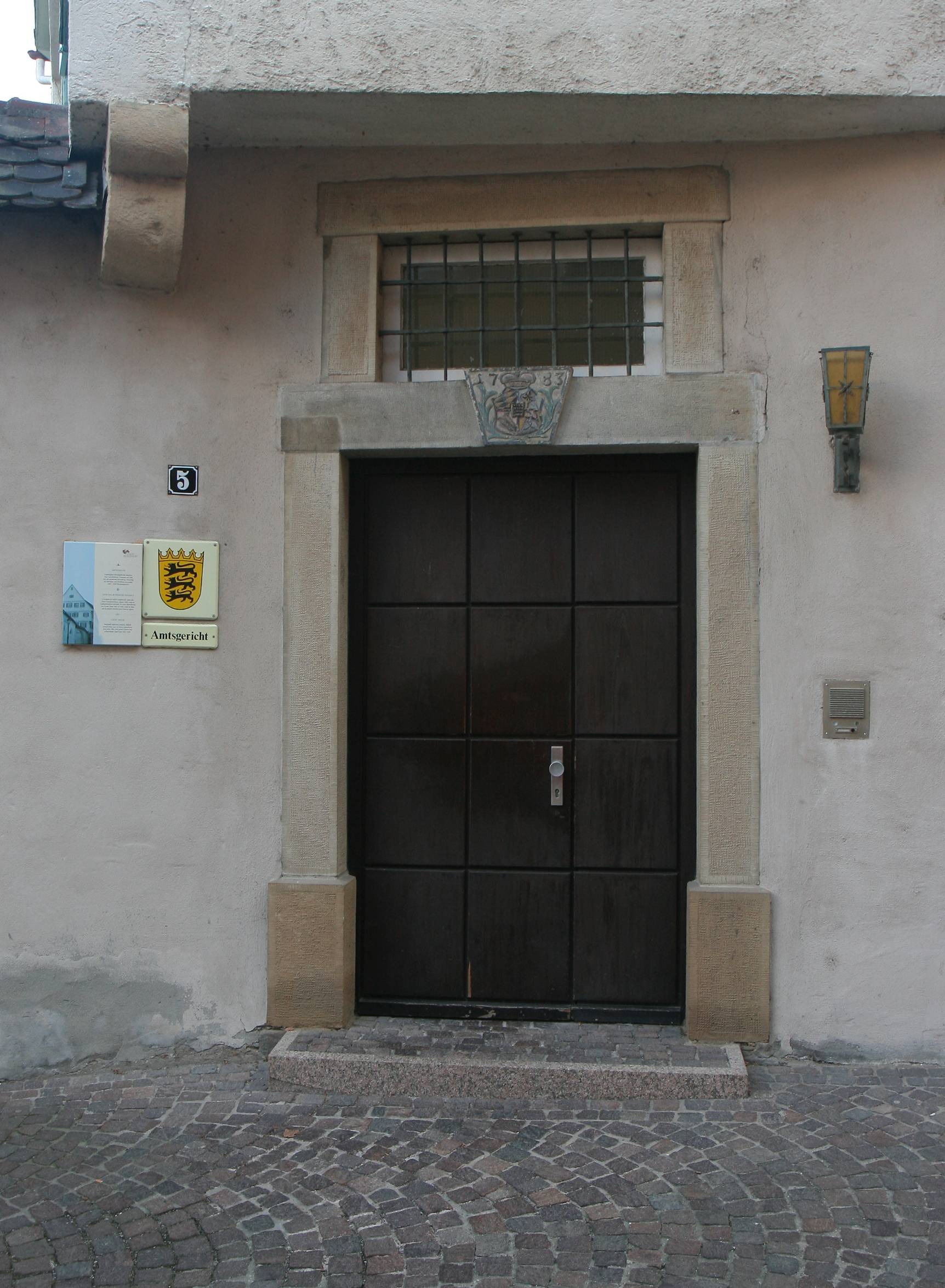 Amtsgericht Besigheim, Amtsgerichtsgasse 5 in Besigheim. Erste urkundliche Nennung des Anwesen ist Ende des 15. Jahrhunderts. Von 1821-1838 Oberamtsgericht. Kulturdenkmal gemäß § 2 DSchG (Gebäude).